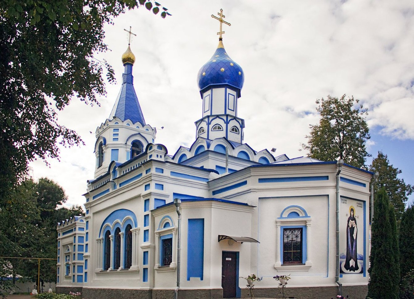 храм